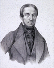 Filippo Civinini, medico e anatomista italiano del XIX secolo.